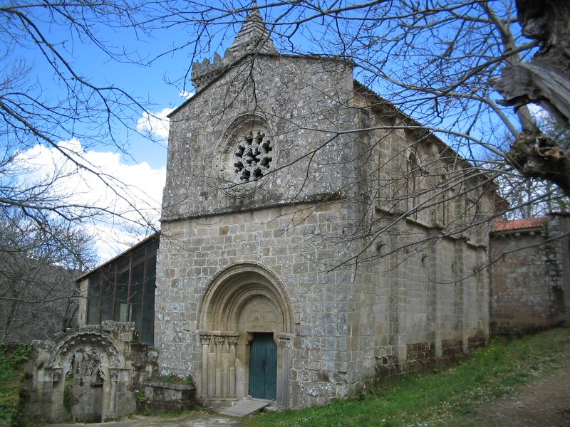 Mosteiro de Santa Cristina de Ribas do Sil, no concello de Parada do Sil (Ourense). O cenobio é documentado ende o ano 876. Mais informacion na ligazón [1]